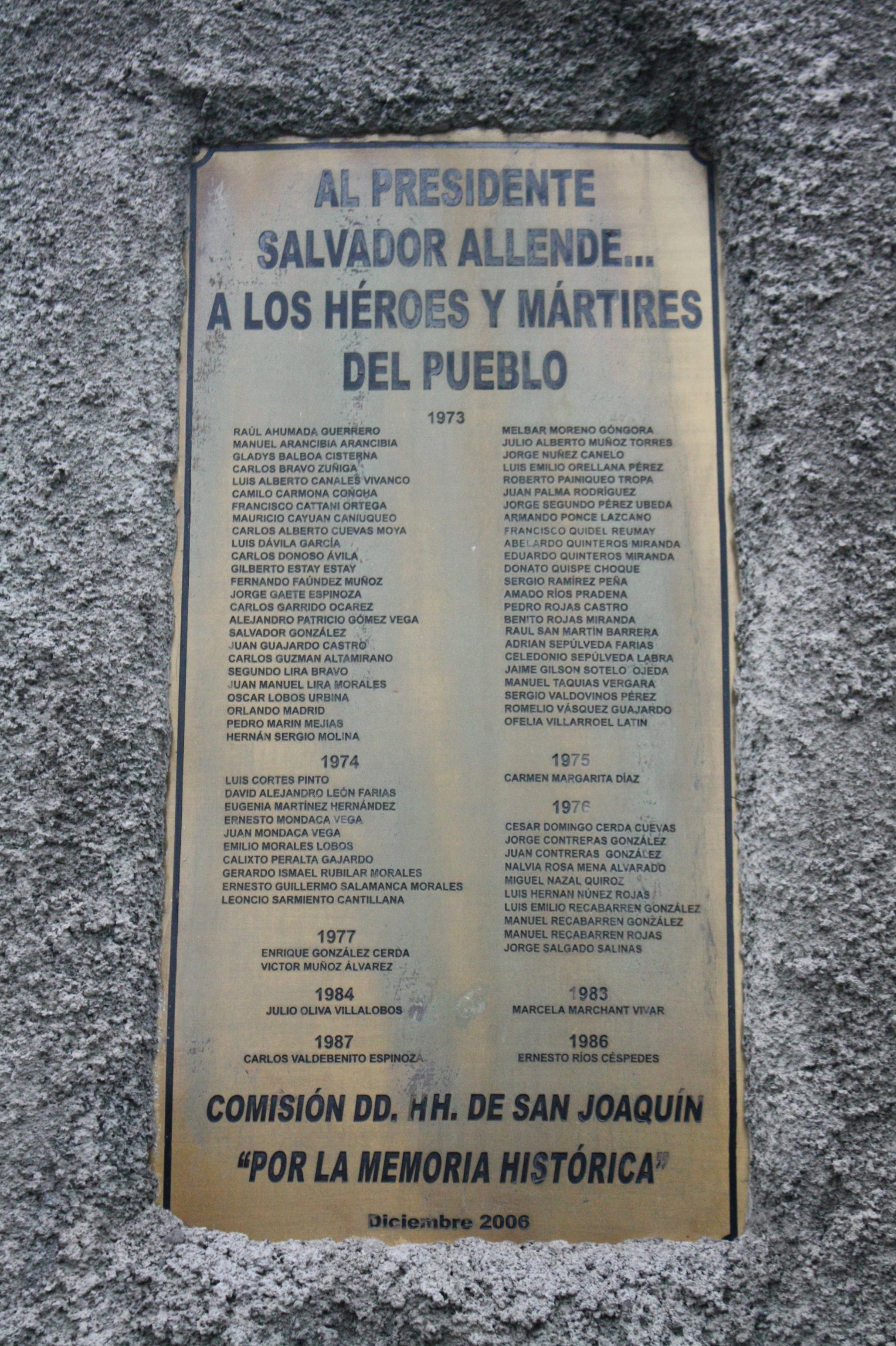 Estructura de bronce